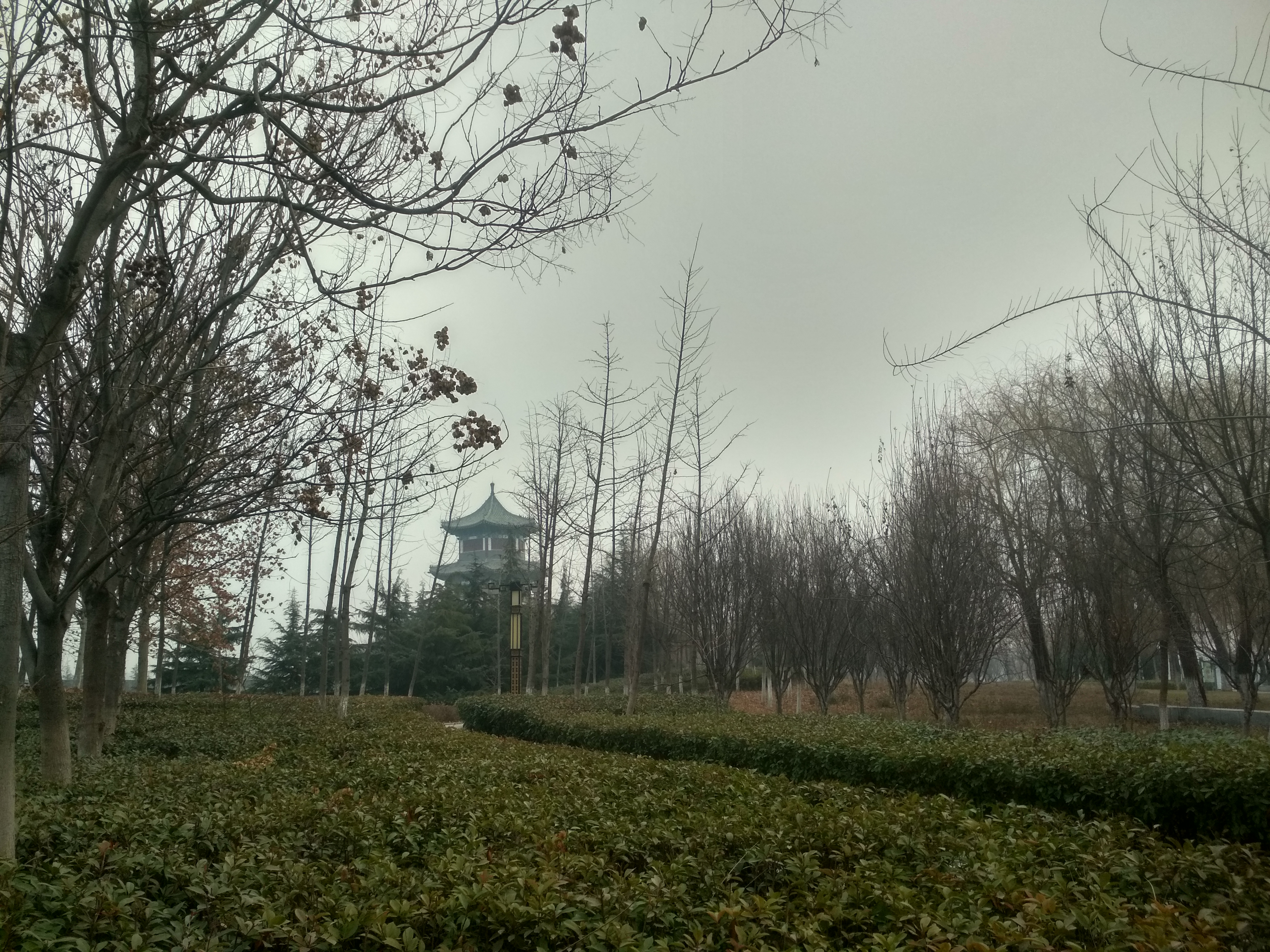 中文（中国大陆）: 中国山东省曲阜市蓼河十里儒家文化旅游景观带景区